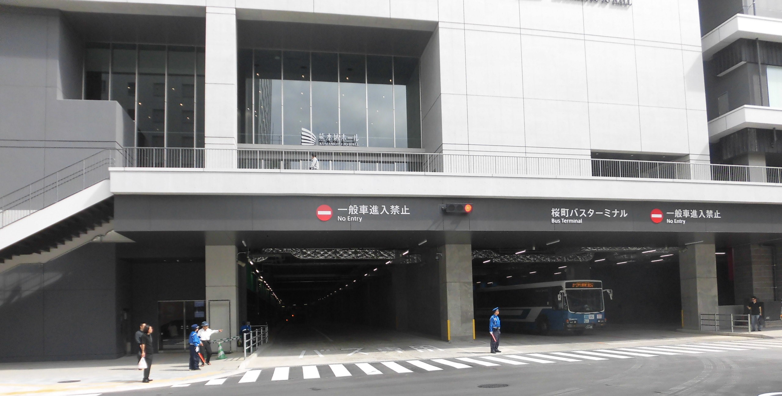 熊本市にある熊本桜町バスターミナル